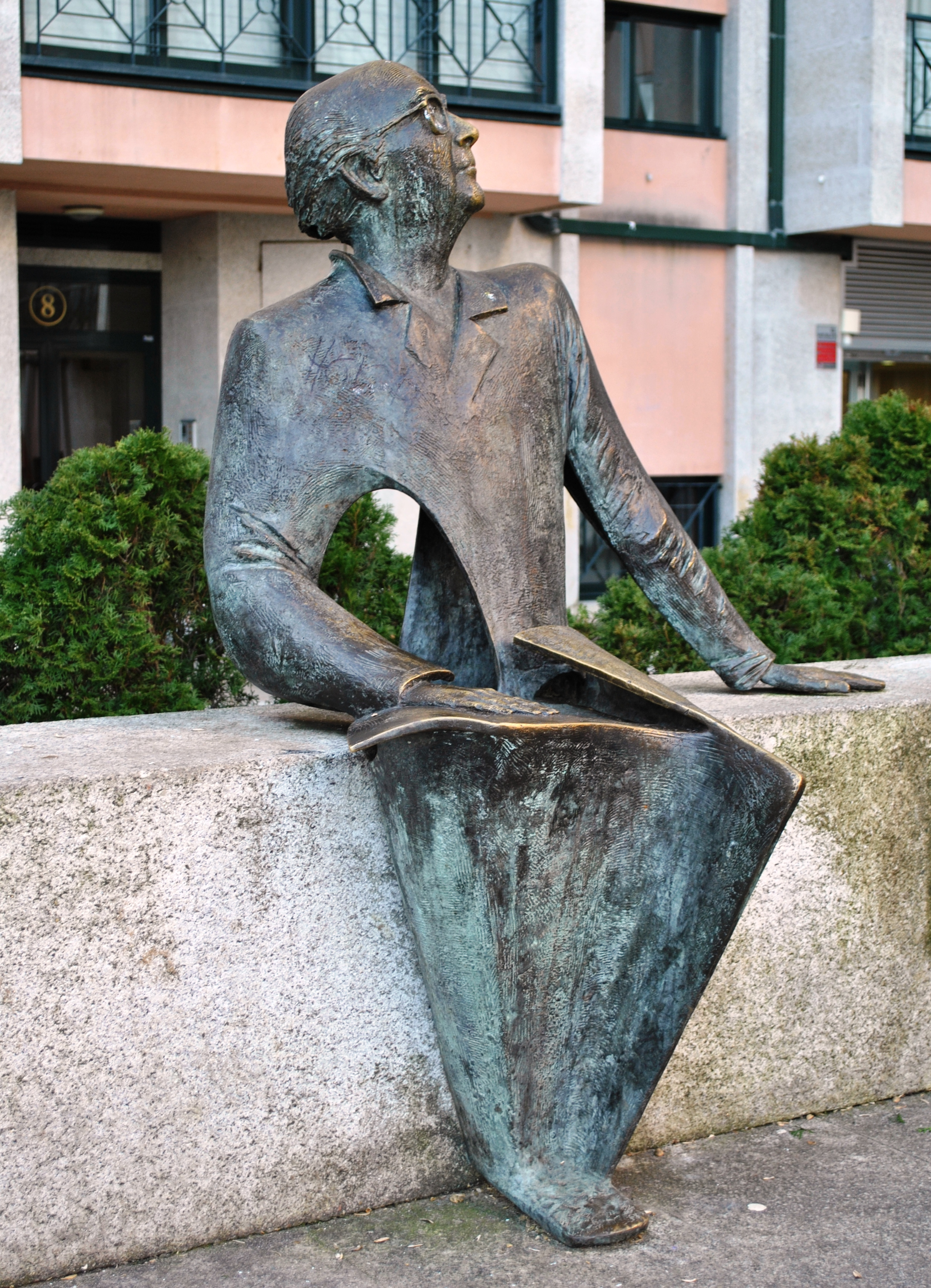 Conxunto de Buciños en Bouzas, José Saramago.jpg